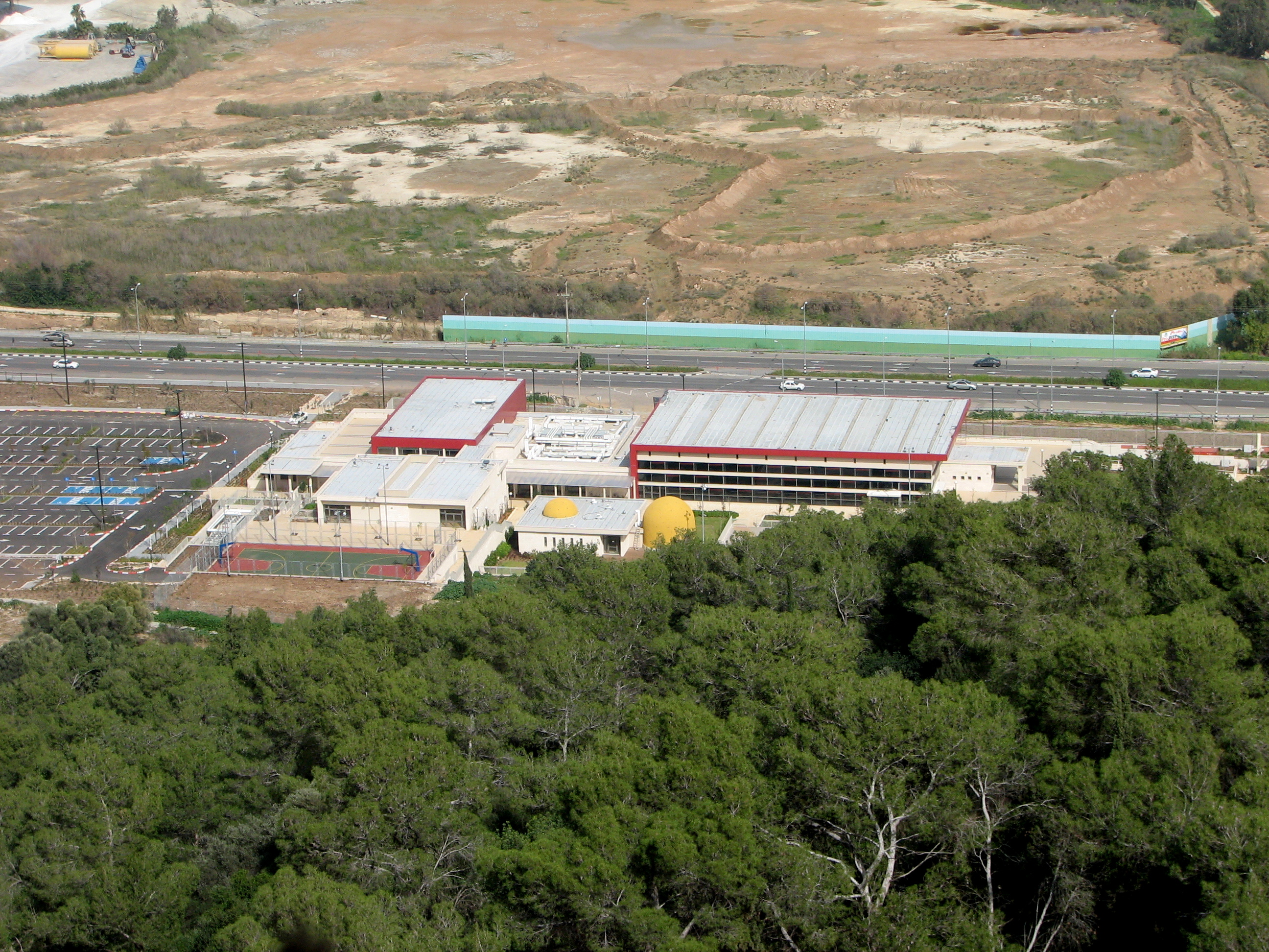 Green Paths, between Nesher - Yagur on Mount Carmel Israel. View from the path השביל הירוק בין העיר נשר וקיבוץ יגור, על הצלע הצפונית של הר הכרמל. מראות על השביל מרכז קיט וספורט החדש של נשר. נמצא בשטח המועצה האזורית עמק זבולון